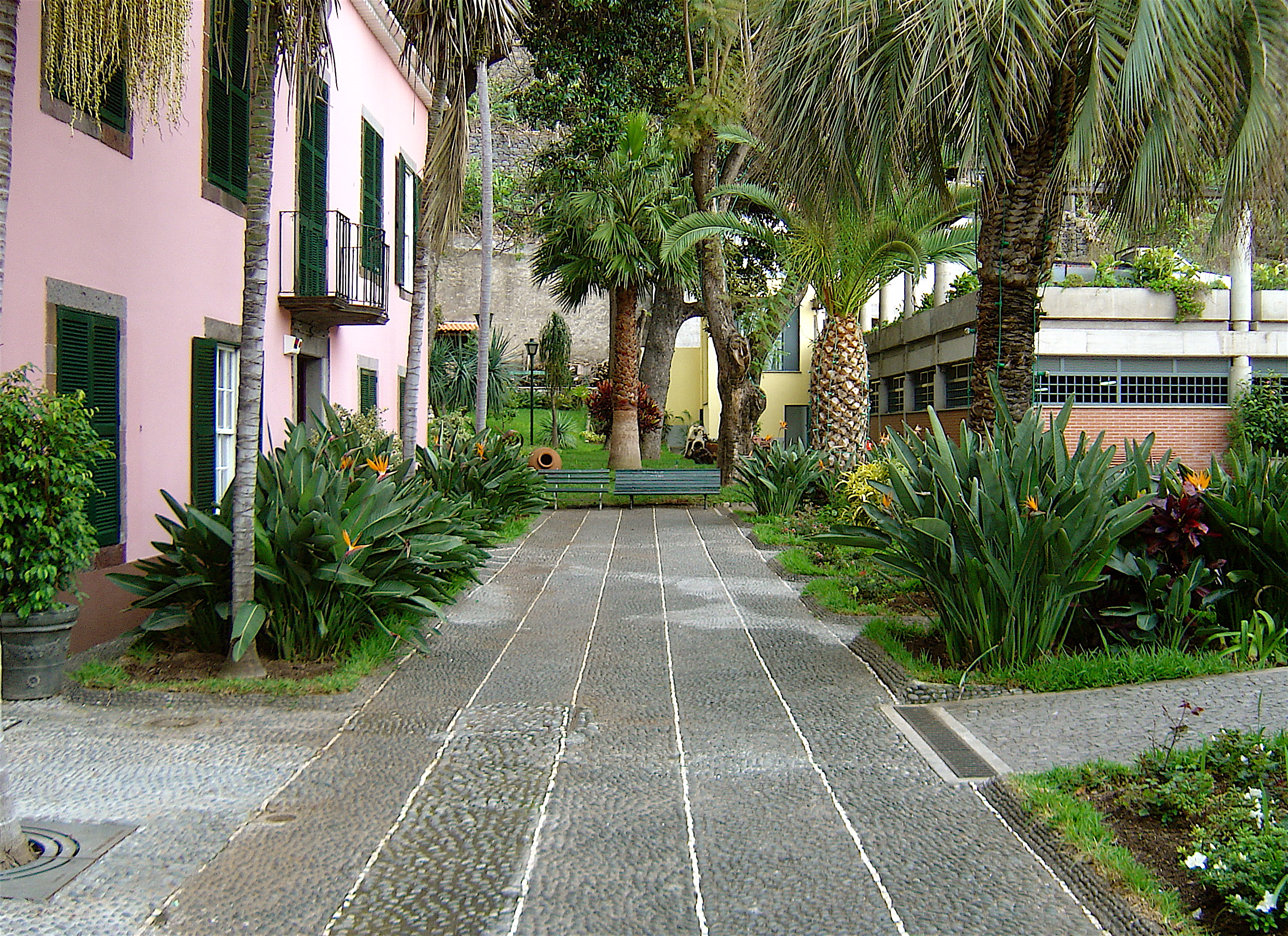 Vegetation im Stadtkern von Riebeira Brava